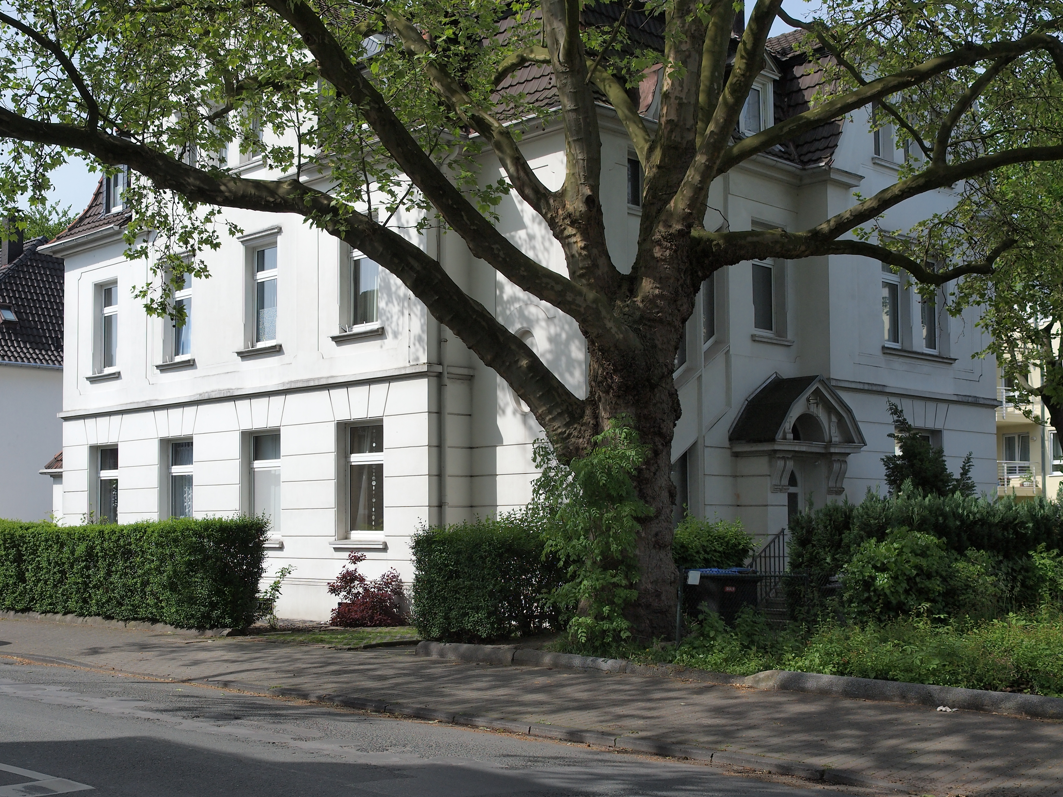 Wohngebäude in Herne-Röhlinghausen, früher Verwaltungsgebäude der Bogestra, Baudenkmal